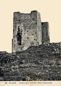 Castell de Montcada (Montcada i Reixac)